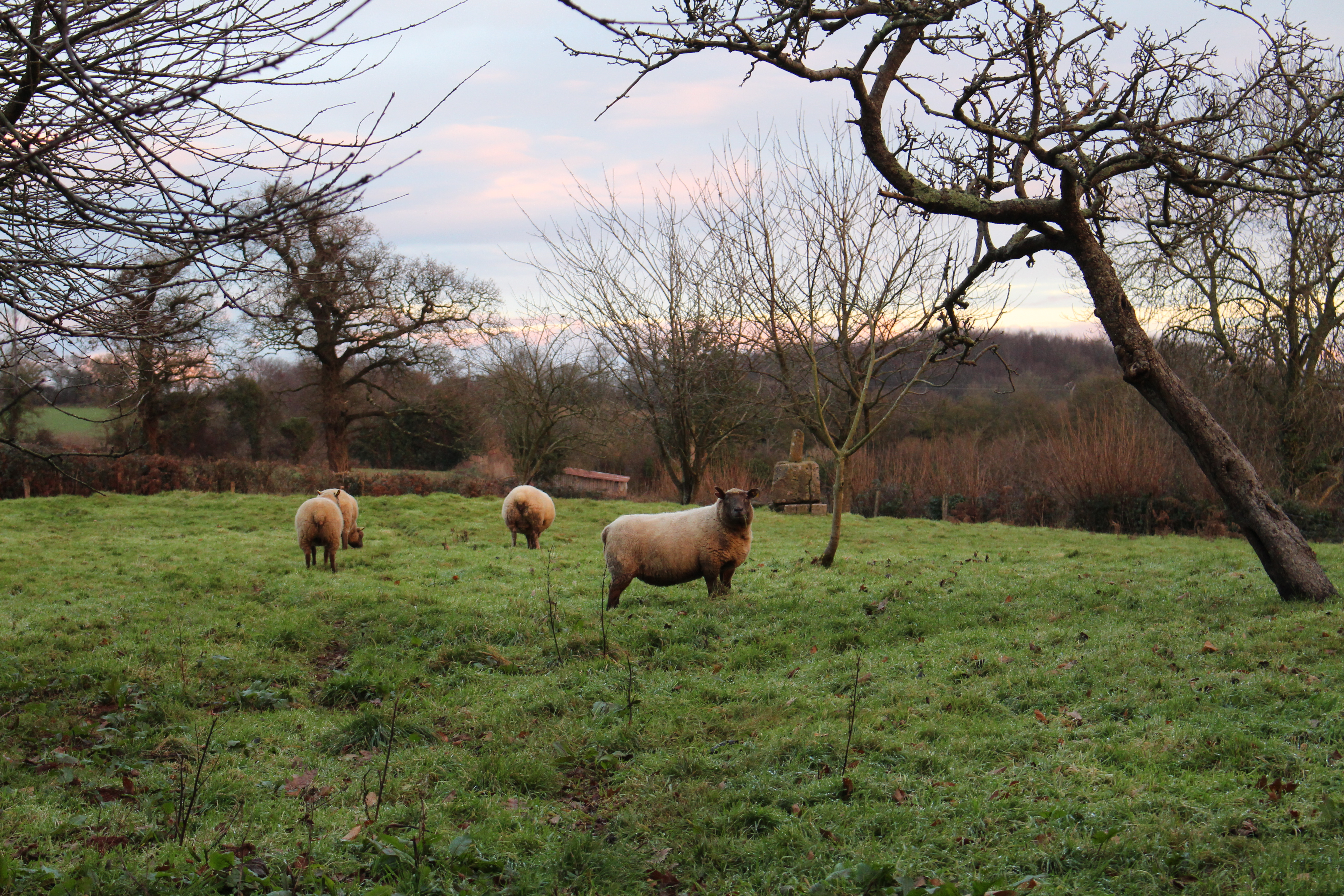 Sainte-Croix-Bocage, Teurthéville-Bocage, Manche